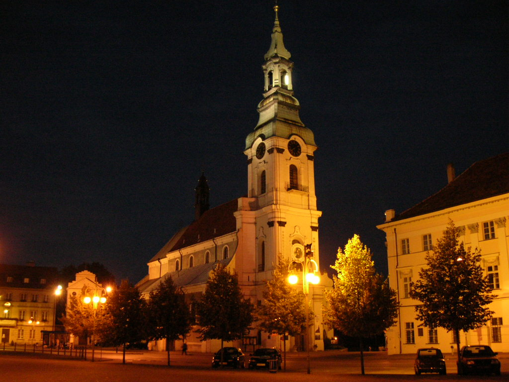 Kalisz - kościół kolegiacki nocą. Autor : Bartek Wawraszko (Bast)